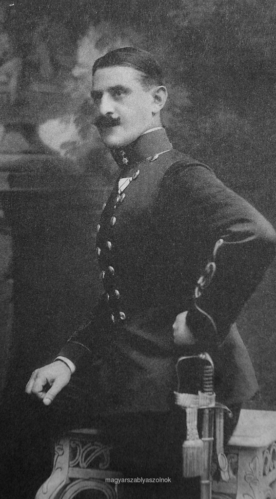 László Borsody (1878-1939), Hungarian fencing master